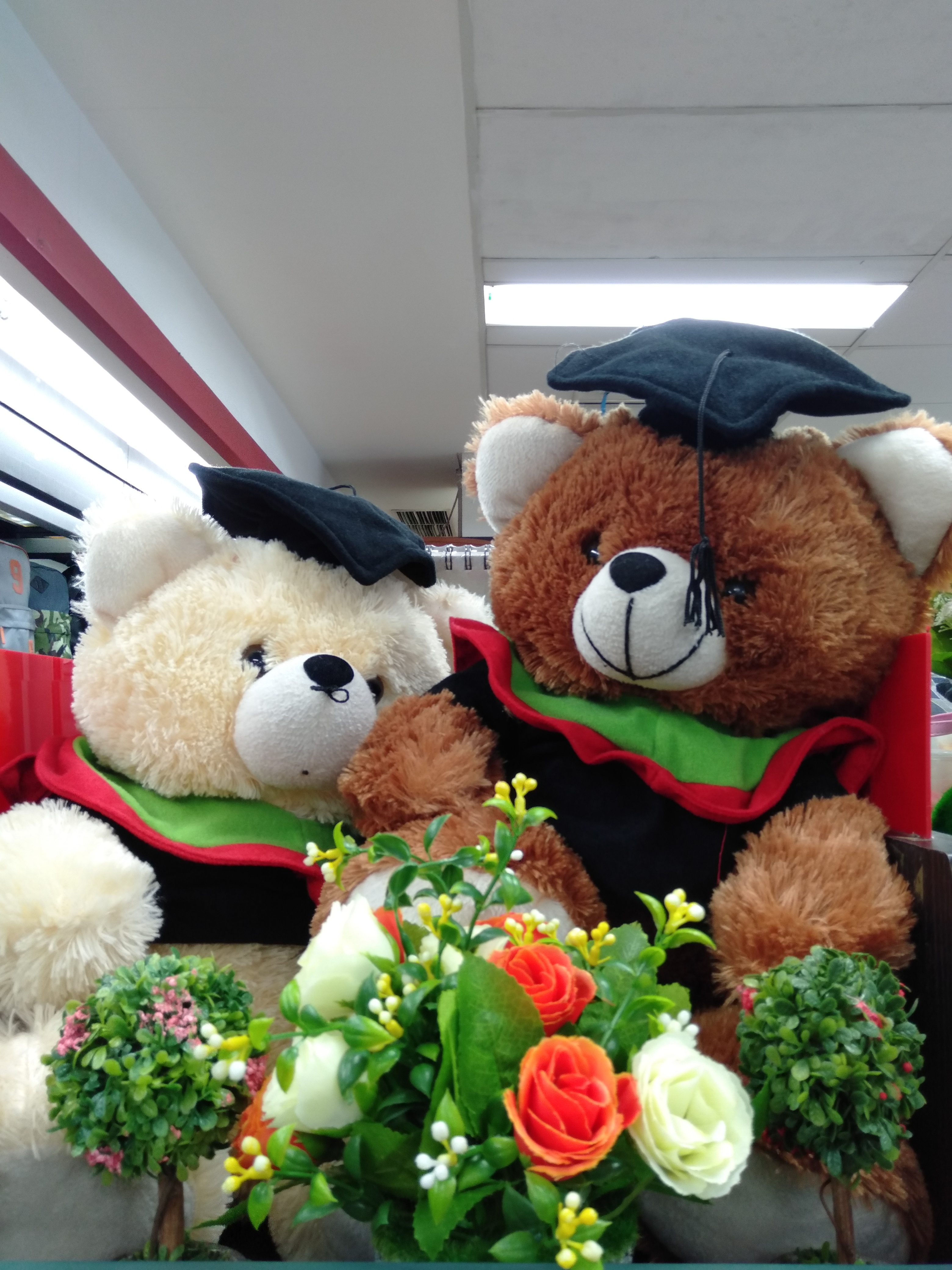 Basa Jawa: Bonéka wisudha utawa bonéka wiwaha iku padatan minangka hadhiah kanggo sawijining wong kang wis rampung anggoné kuliyah. Ing gambar iku, katon bonéka hadhiah wiwaha loro ingkang néngsemake ati. Toga ingkang dienggo bonéka nambahi maknané. Warna putih lan coklat bisa hamemilut ati wong kang nyawang.